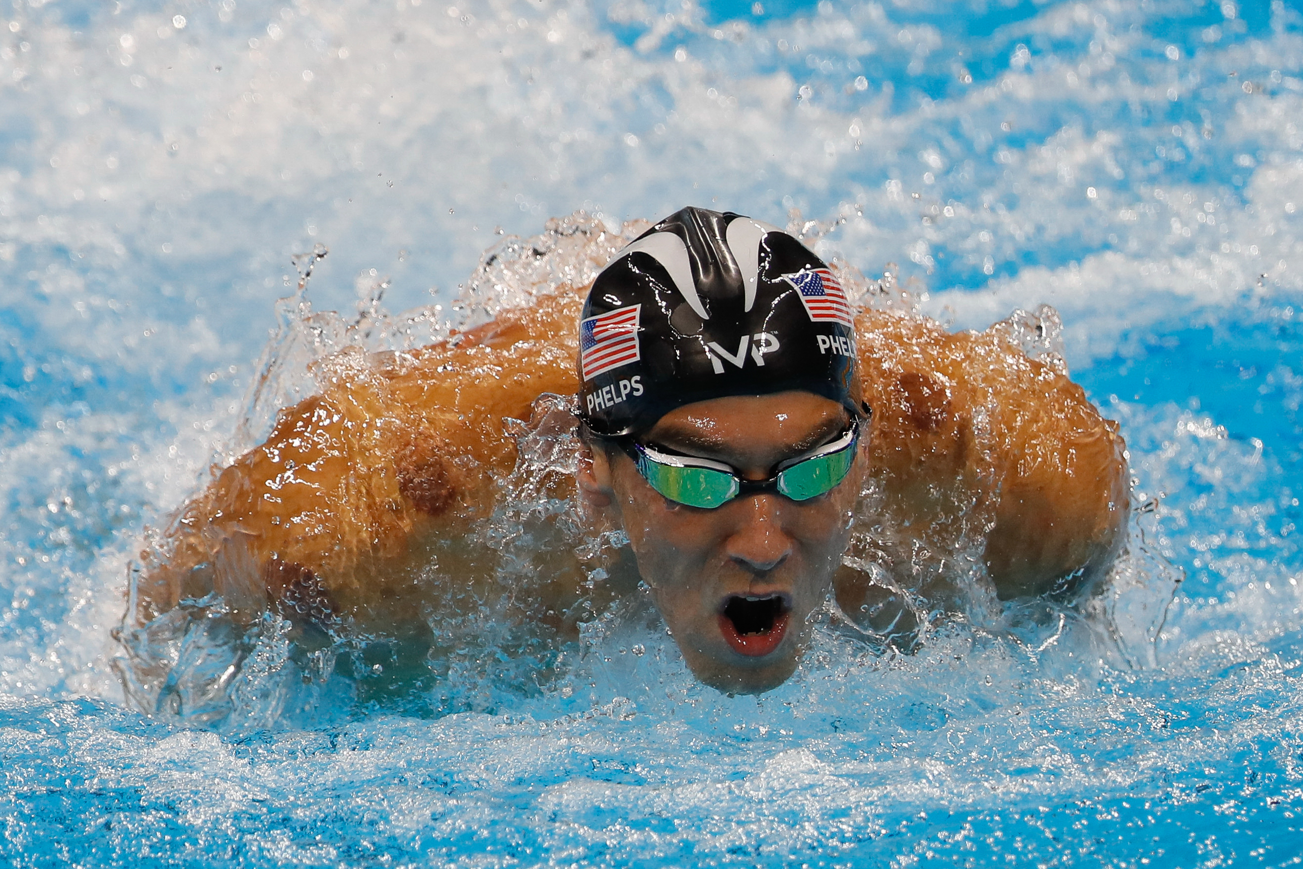 Rio de Janeiro - Michael Phelps, dos Estados Unidos, ganha sua 20ª medalha de ouro olímpica, nos 200m nado borboleta, nos Jogos Rio 2016. (Fernando Frazão/Agência Brasil)